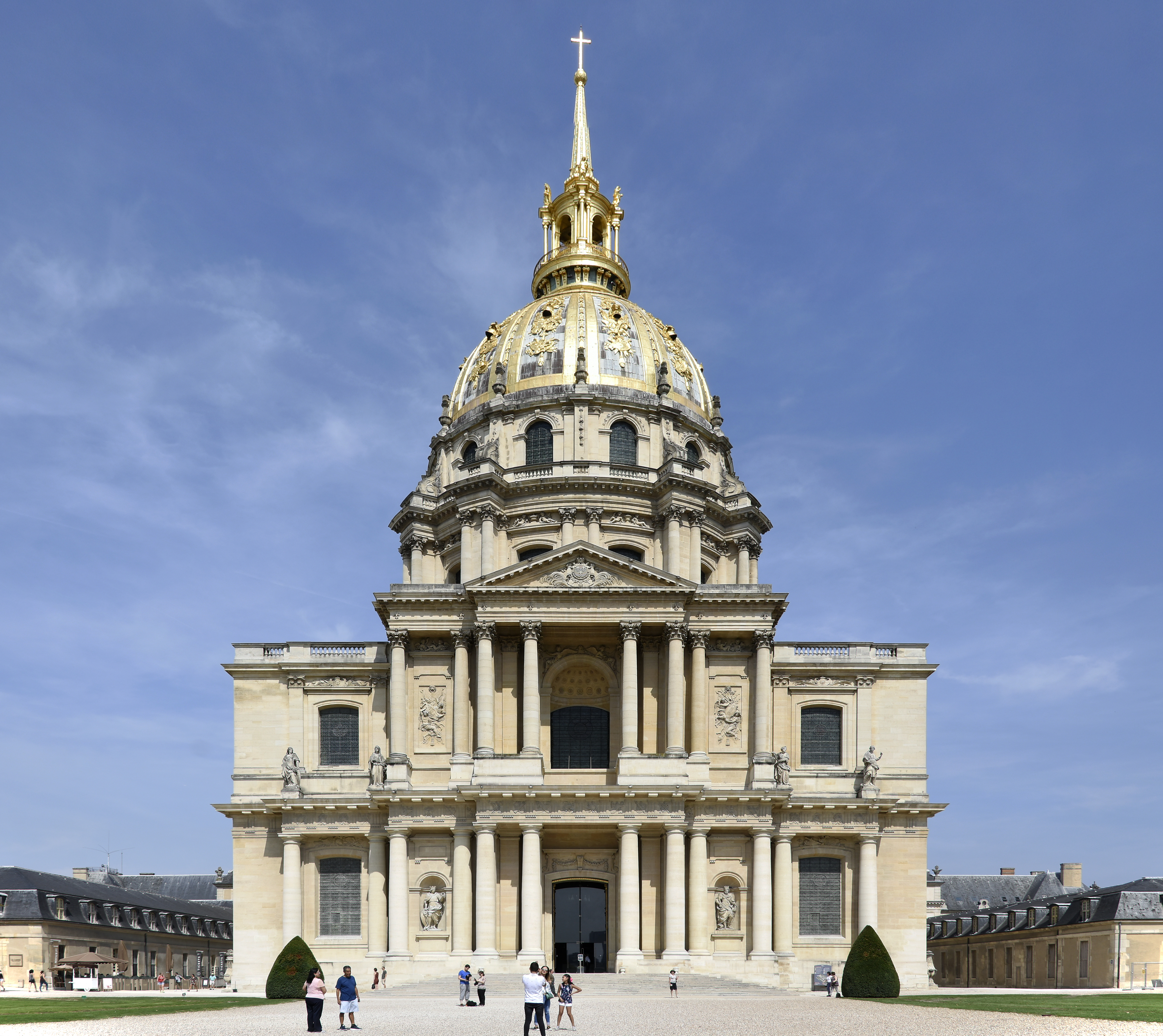 Dôme des Invalides - Parijs